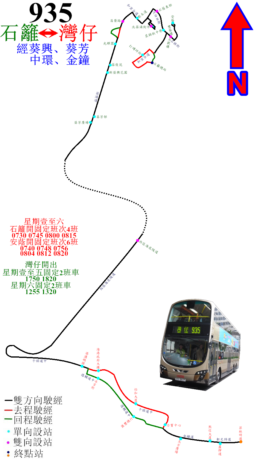 中文（香港）: 過海隧巴935線的走線圖